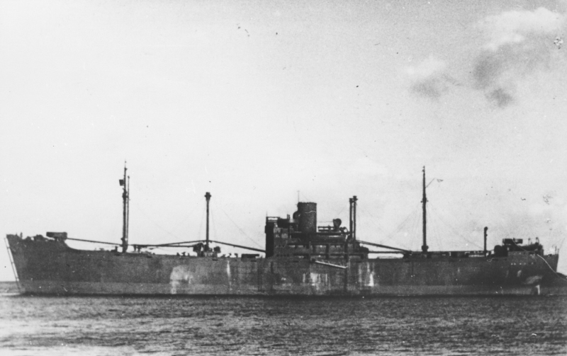 MS «Gotenland»